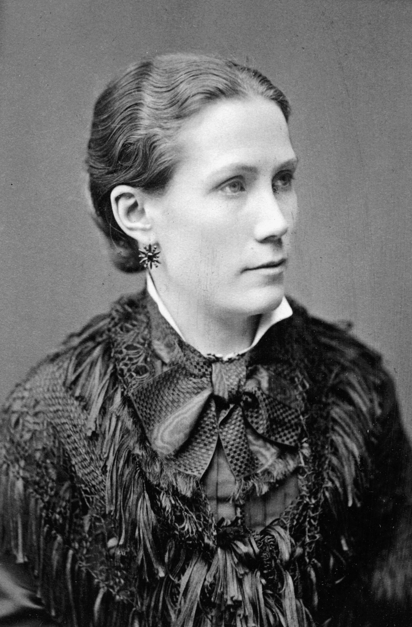 Hilda Klefberg, skådespelare vid Nya teatern 1884